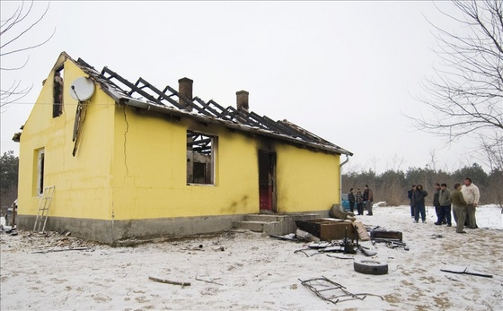 Tatárszentgyörgy